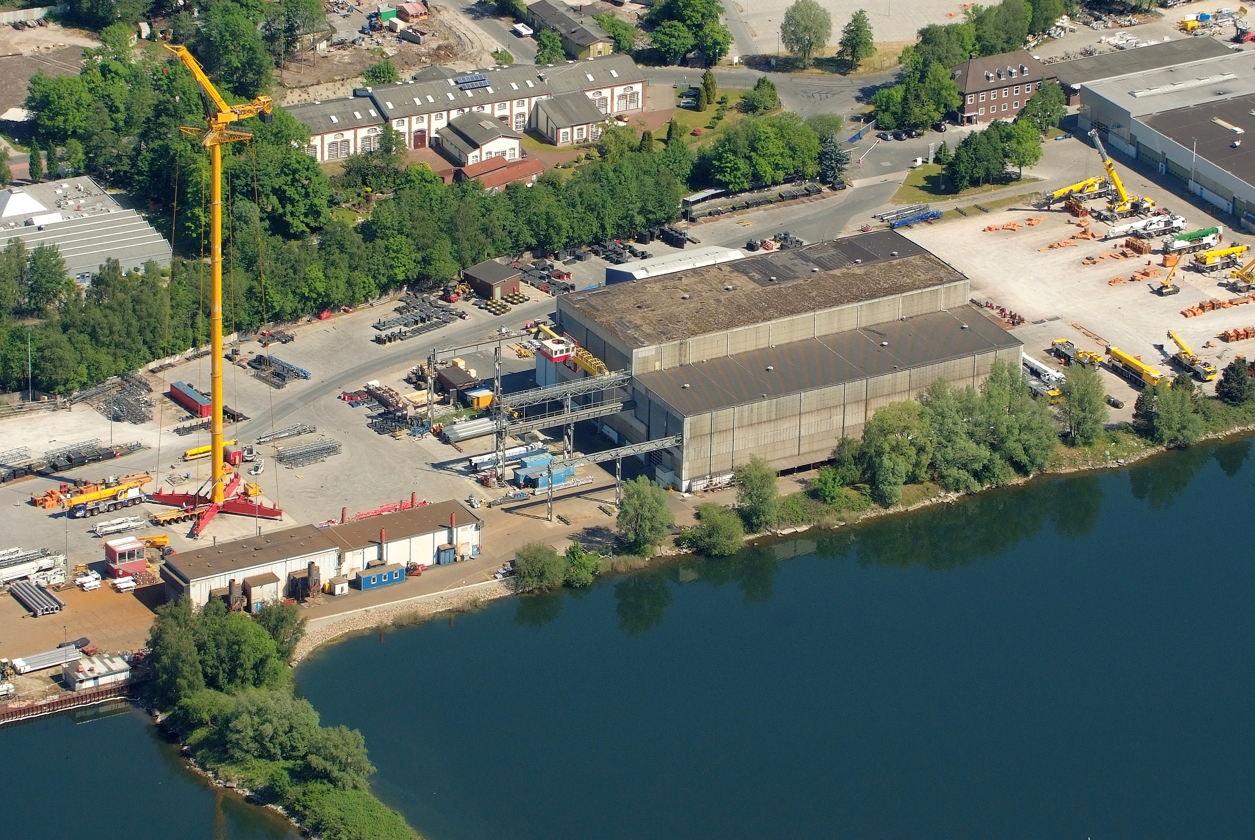 Fotoflug vom Flugplatz Nordholz-Spieka über Cuxhaven und Wilhelmshaven